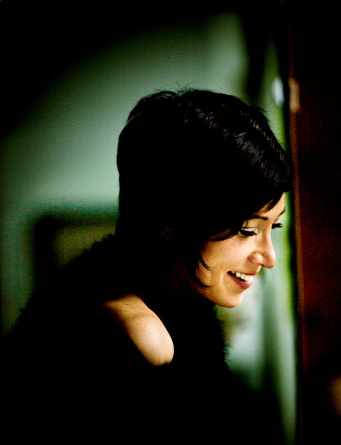 Belgian author Saskia de Coster